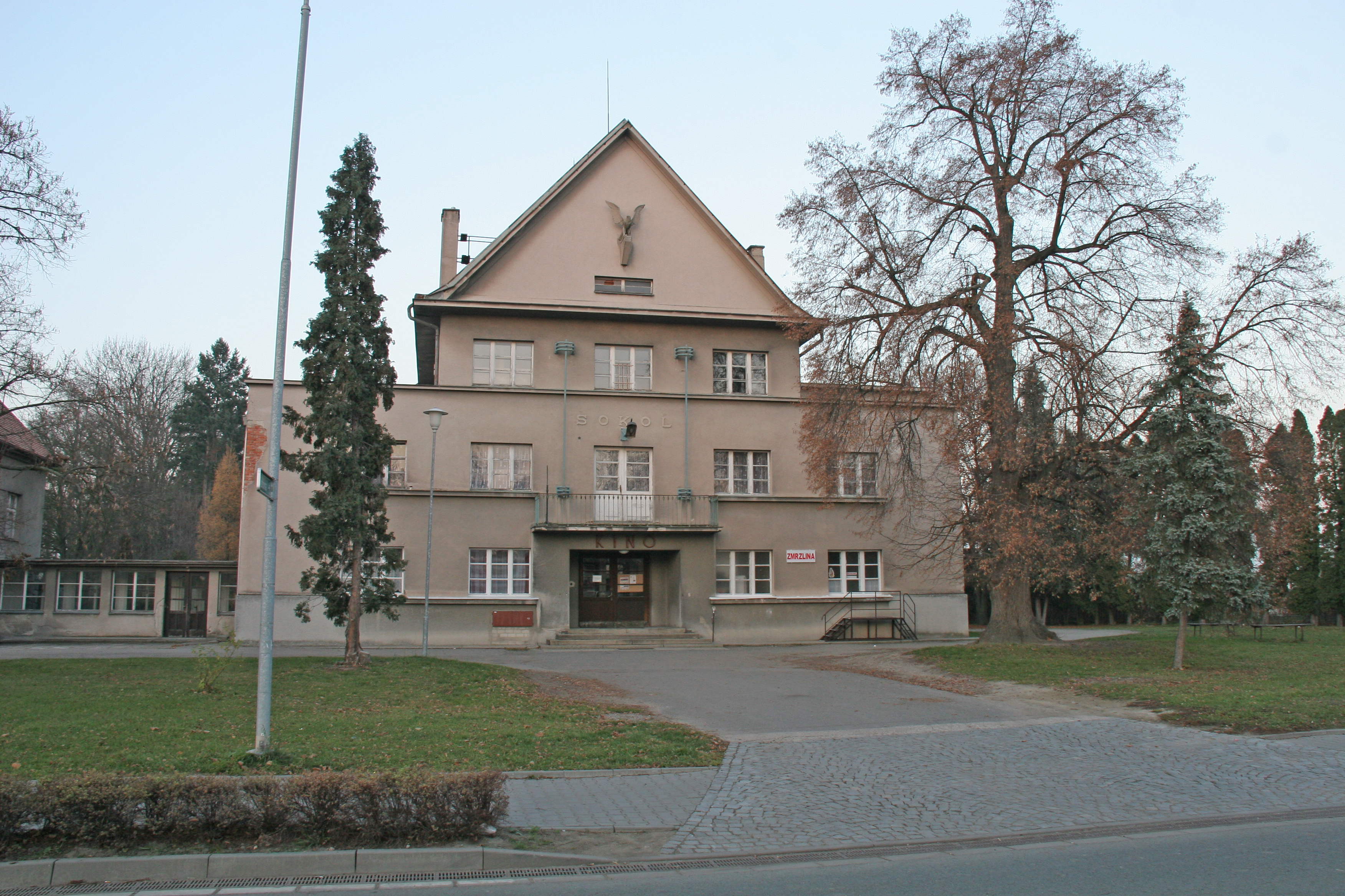 Tělocvična - sokolovna (Dolní Roveň), Dolní Roveň 121